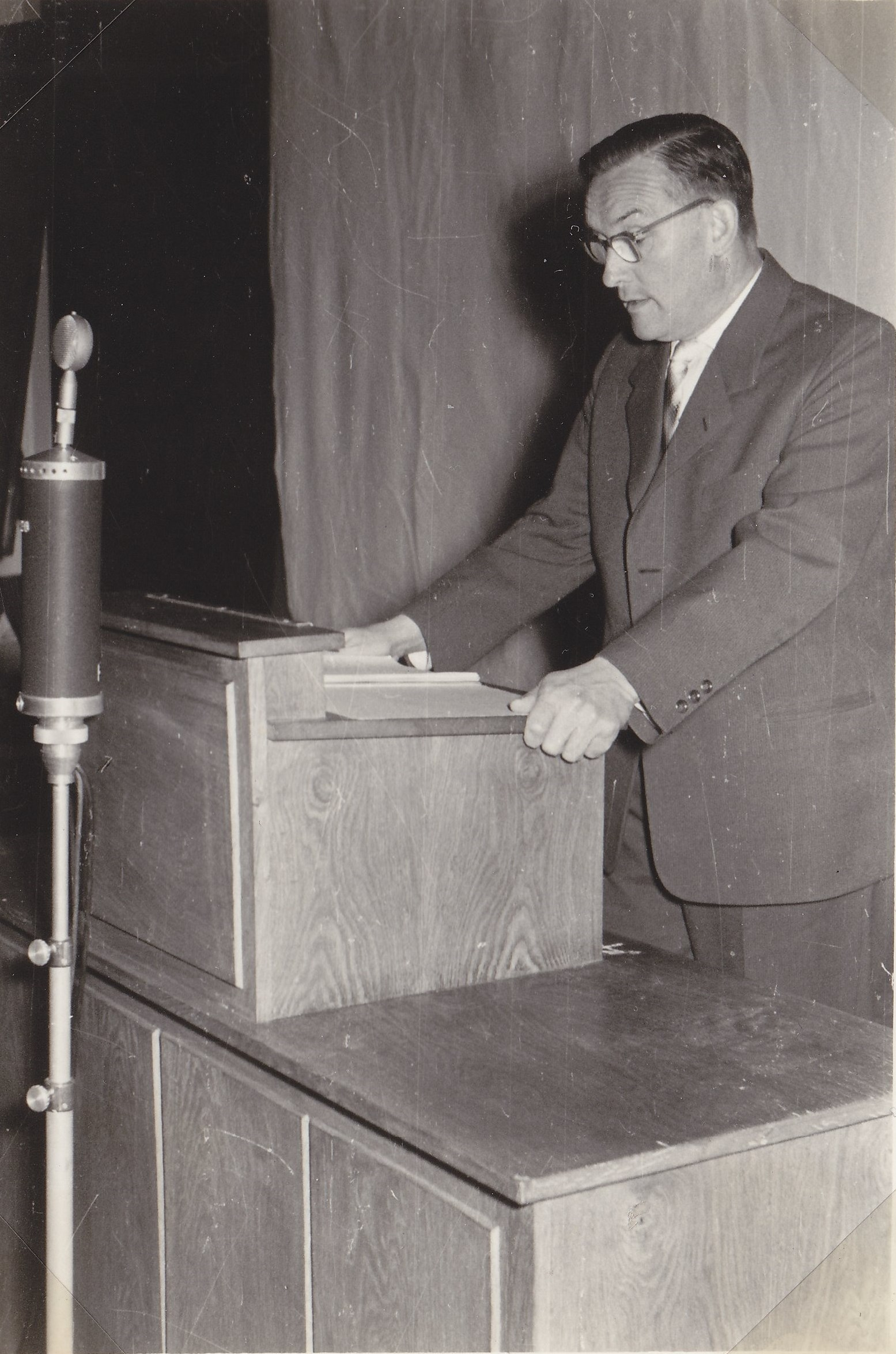 Professor Dr.Ing. Erhard Schlechte 1969, Hochschule für Bauwesen Leipzig